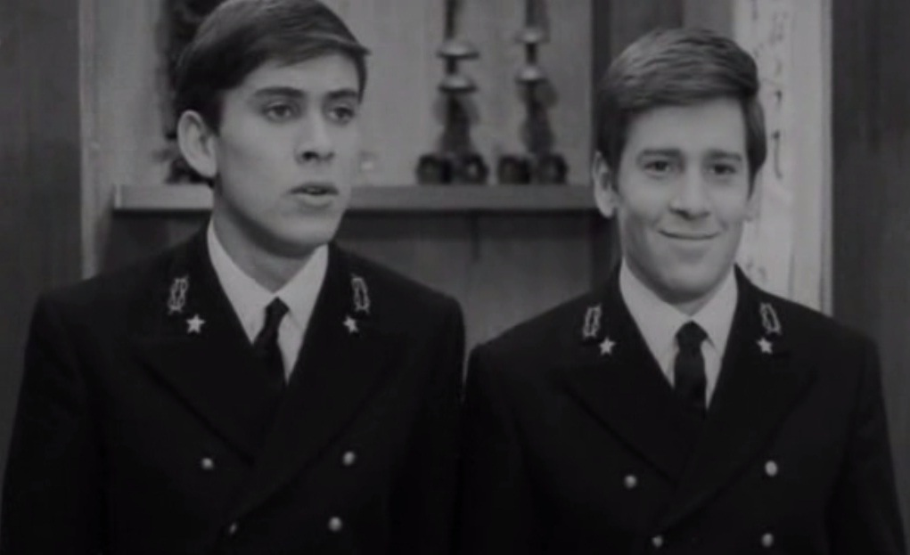 Screenshot del film Mi vedrai tornare (1966) di Ettore Maria Fizzarotti